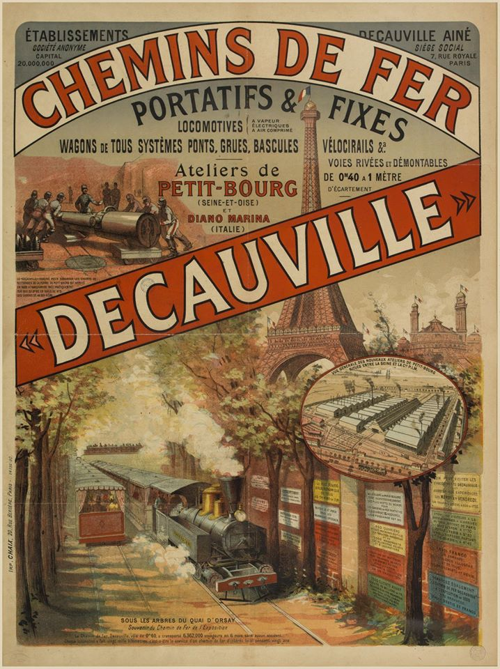 Chemins de fer portatifs & fixes Decauville